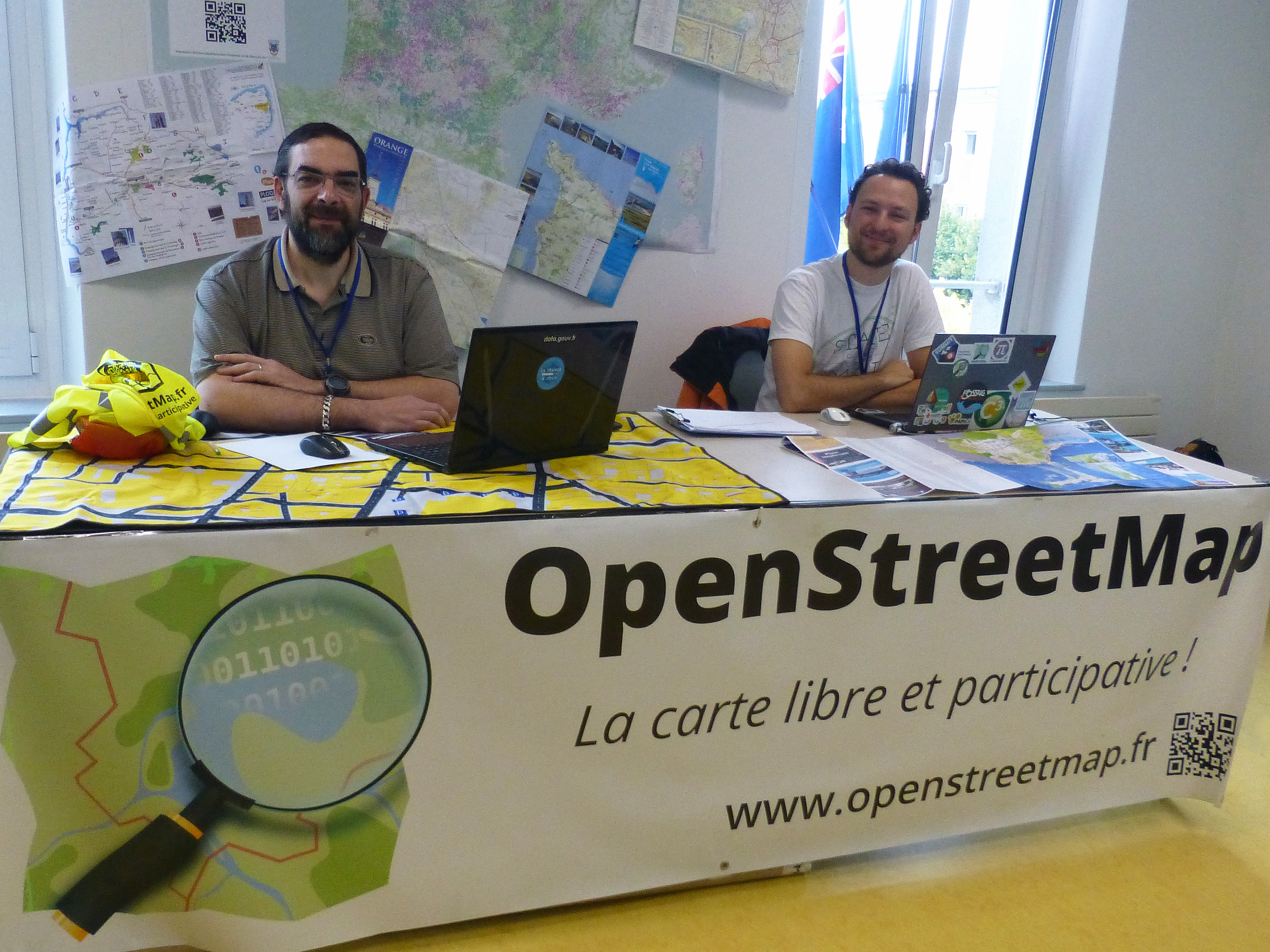 Festival international de géographie 2015 à Saint-Dié-des-Vosges : stand d'OpenStreetMap au Salon de la Géomatique (à gauche, Christian Quest)